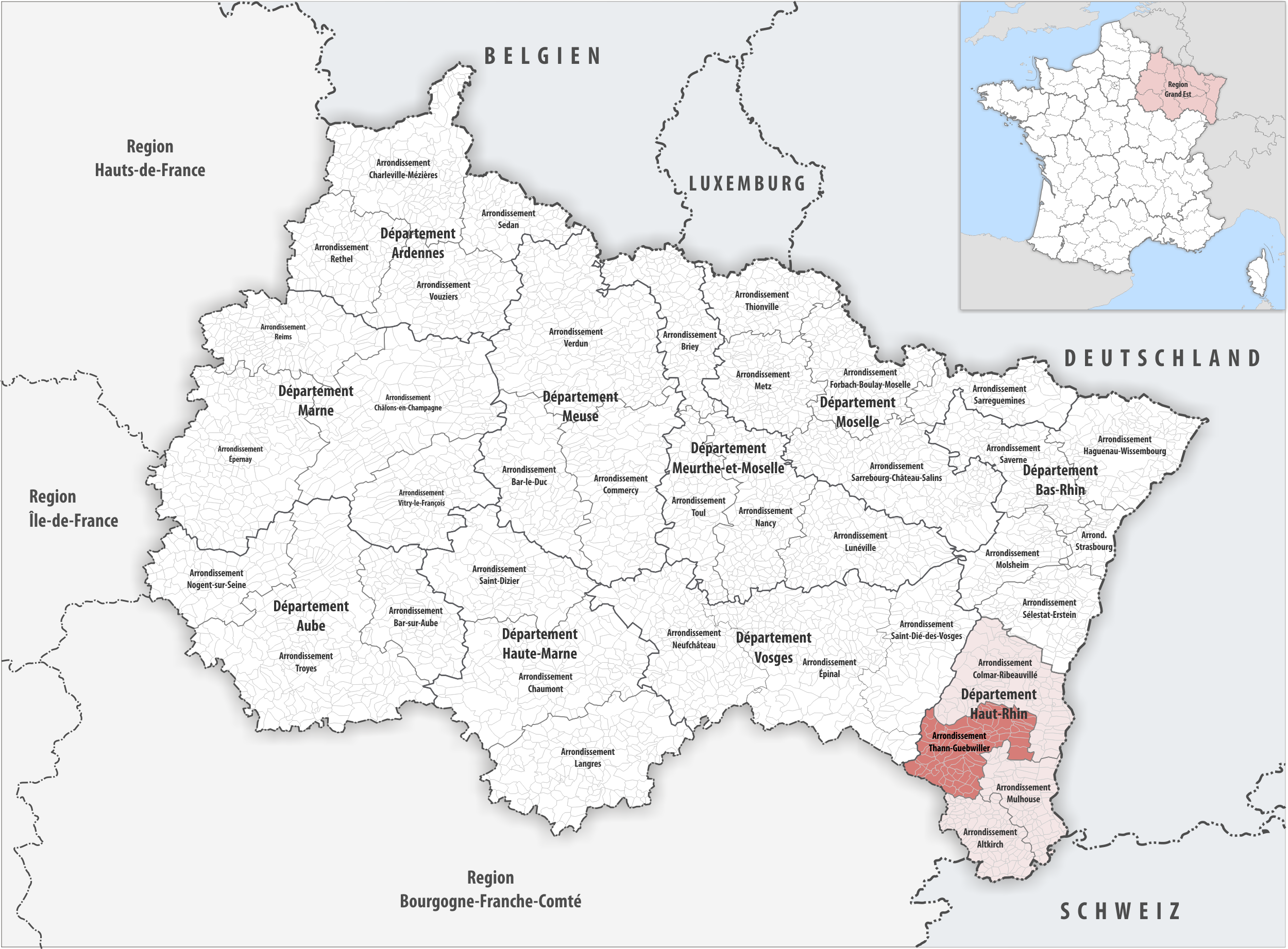 Lage des Arrondissements Thann-Guebwiller